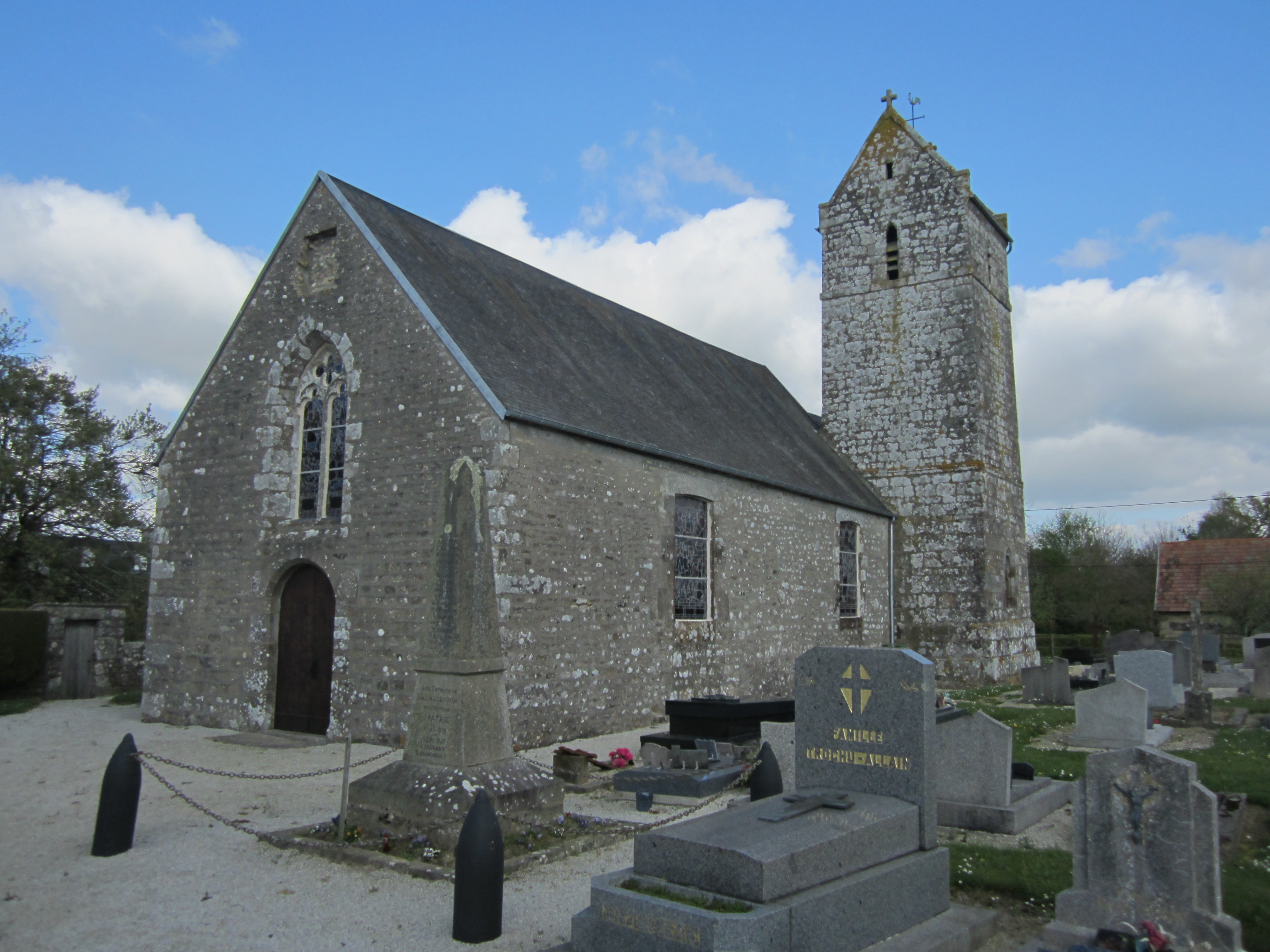 Champcervon , MAnche